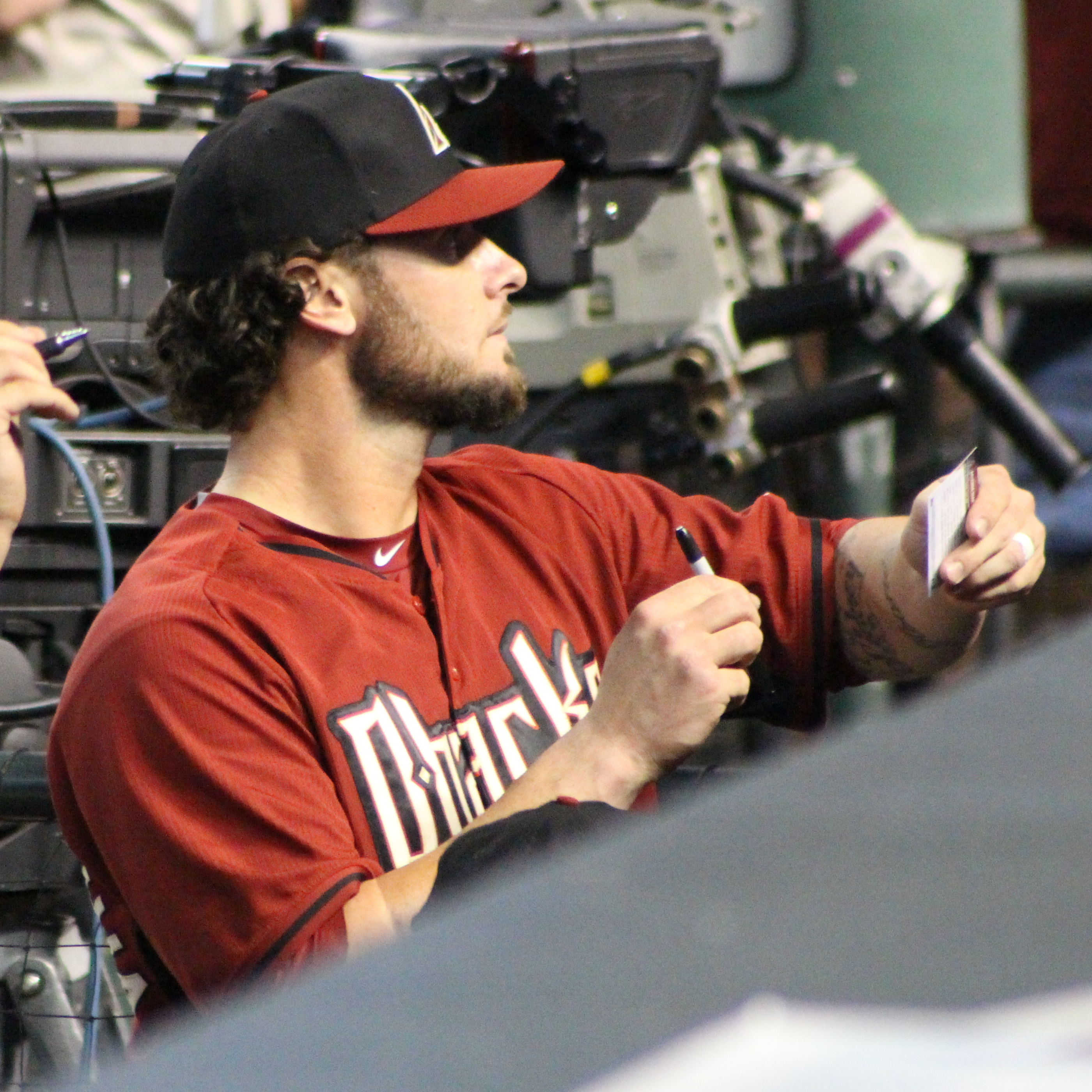 Jarrod Saltalamacchia